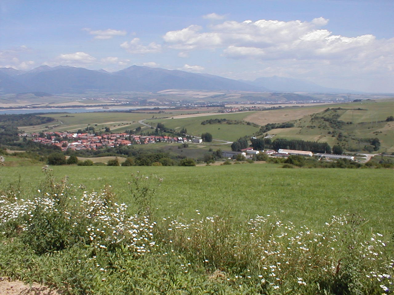 Michalovce-Stausee, Mittelslowakei selbst fotografiert (Olympus 840L) Sommer 2003, Geof 16:24, 24. Sep 2006 (CEST)